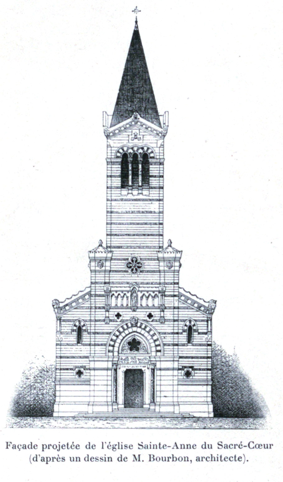 Illustrations pour l'Histoire des églises et chapelles de Lyon